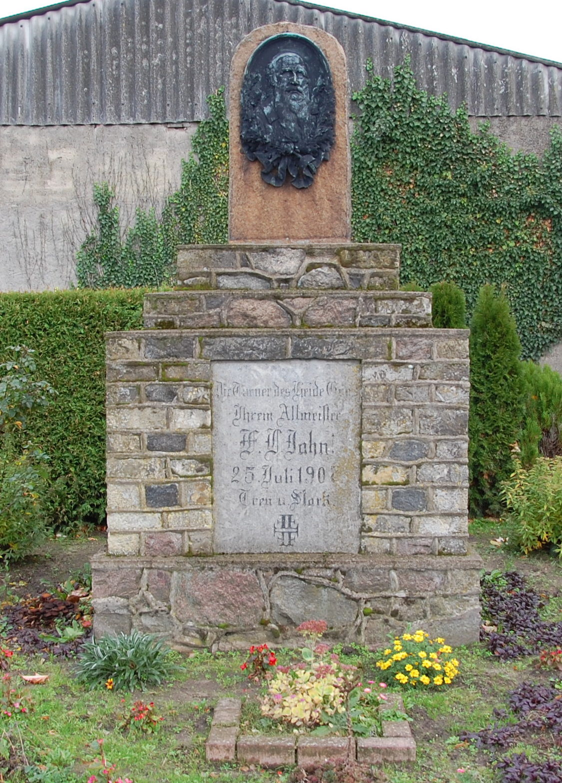 Jahndenkmal in Dolle